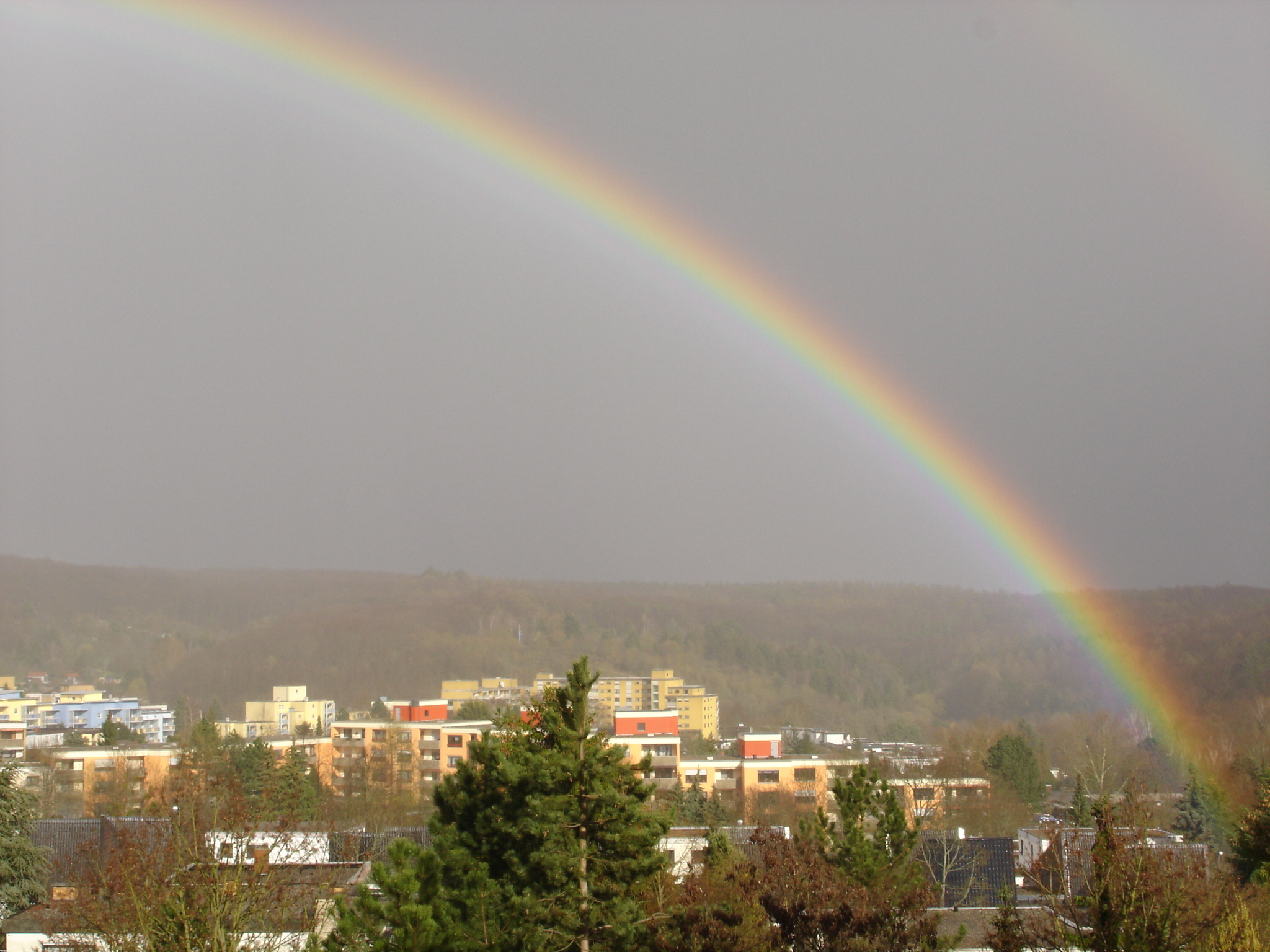 Regenbogen über dem Deutschhof